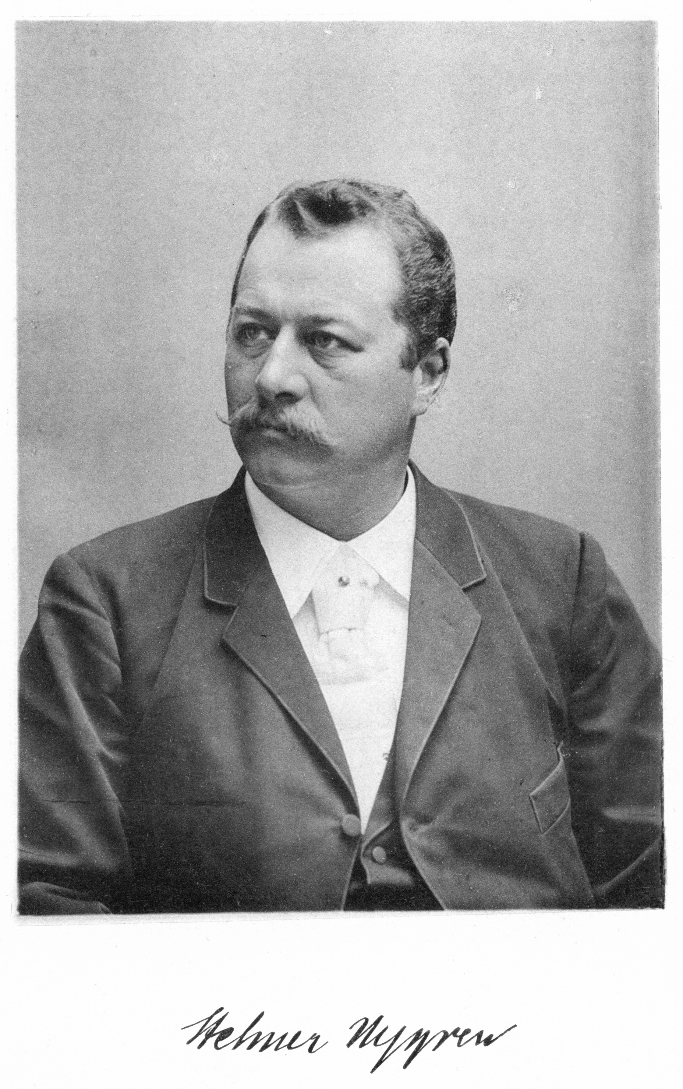 Helmer Nygren (1858-1913)